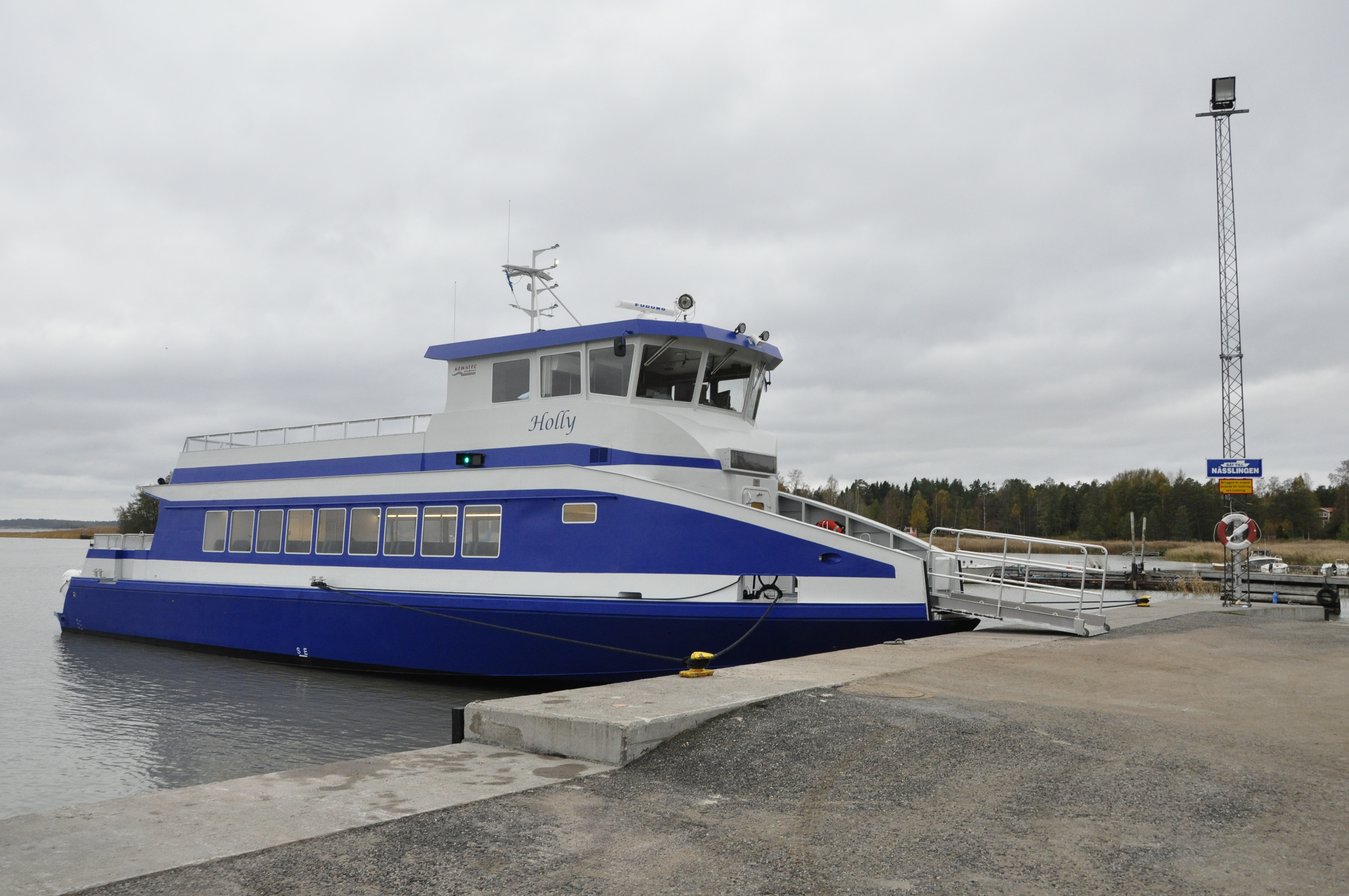 M/S Holly vid bryggan i Åsätra, Ljusterö.